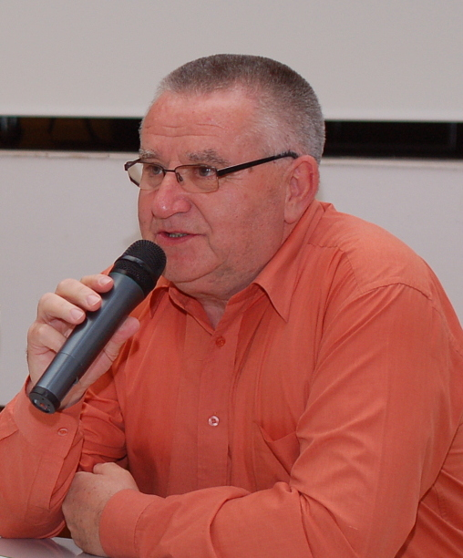 Jiří Krátký na debatě "Chytrá volba: Aneb koho letos (ne)volit?" pořádané Respekt Institutem